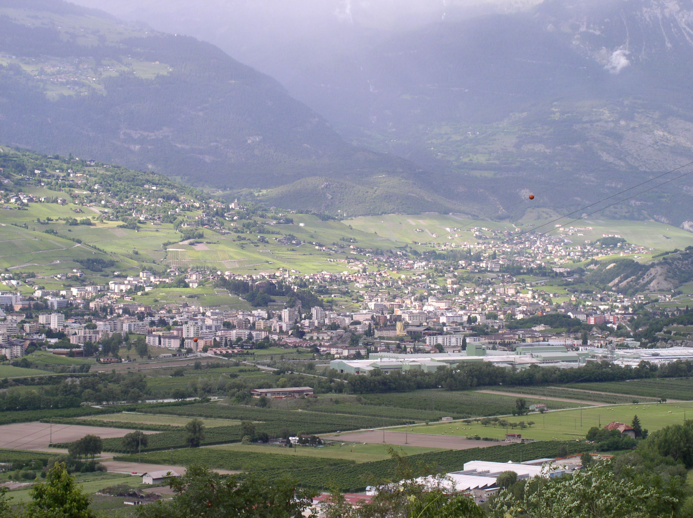 Sierre, Valais, Switzerland